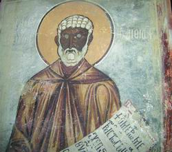 Икона на Св. Мојсеј Мурин во манастрирската црква посветена на Св. Никола во село Манастир, мариовско, Македонија